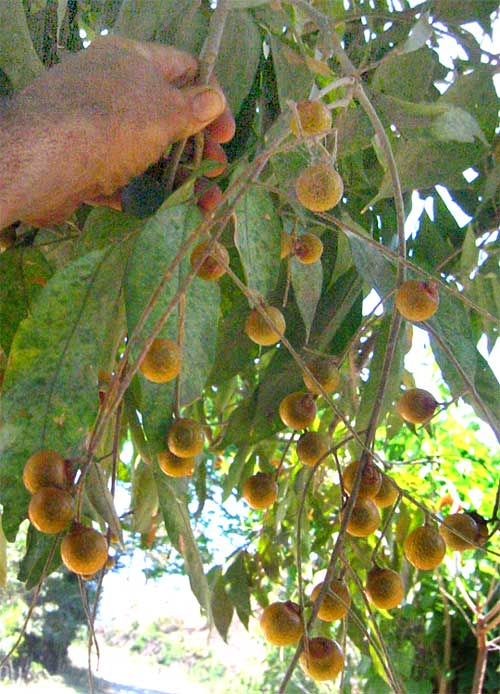 Sapindus saponaria fruits